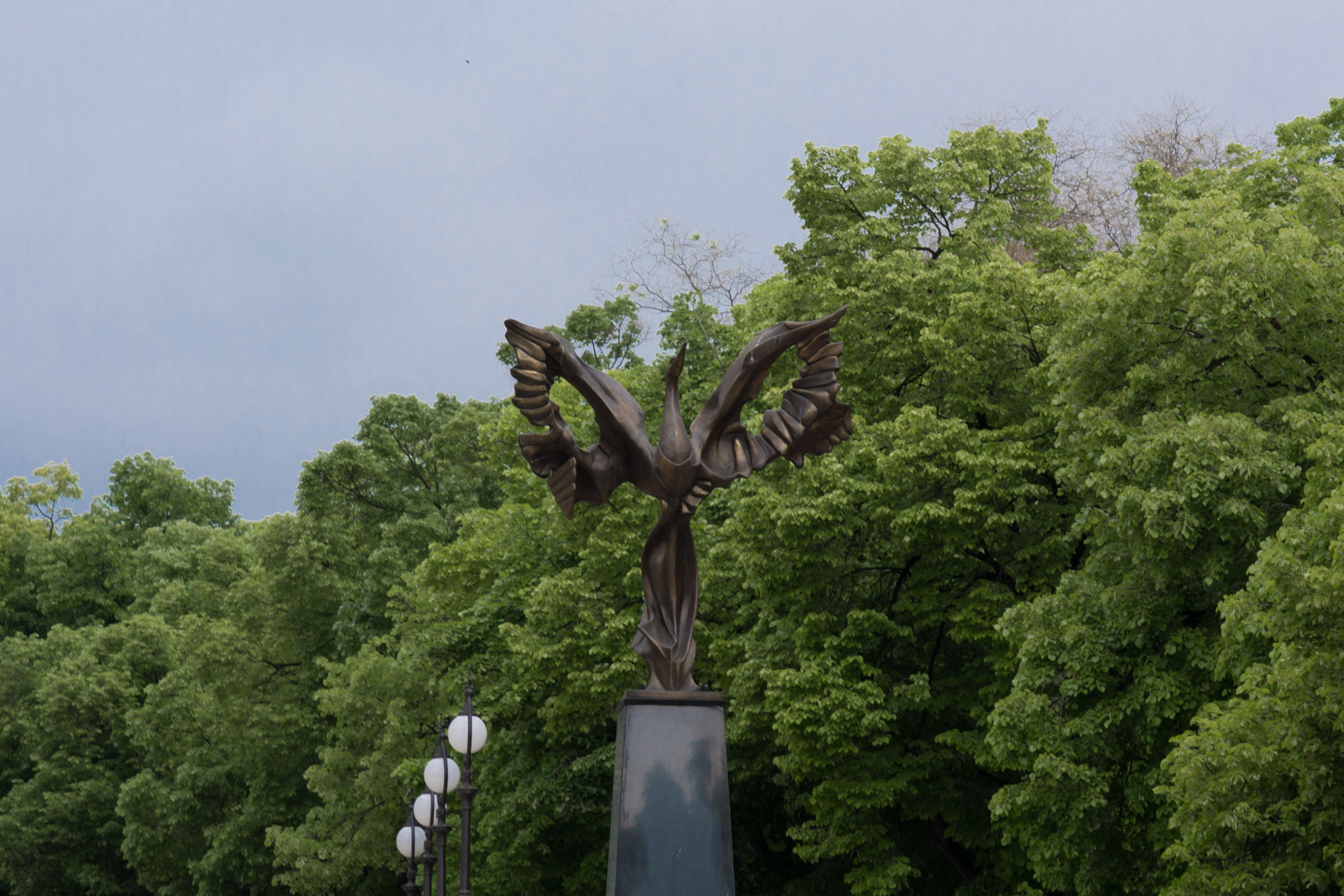 Стара Загора, април 2014